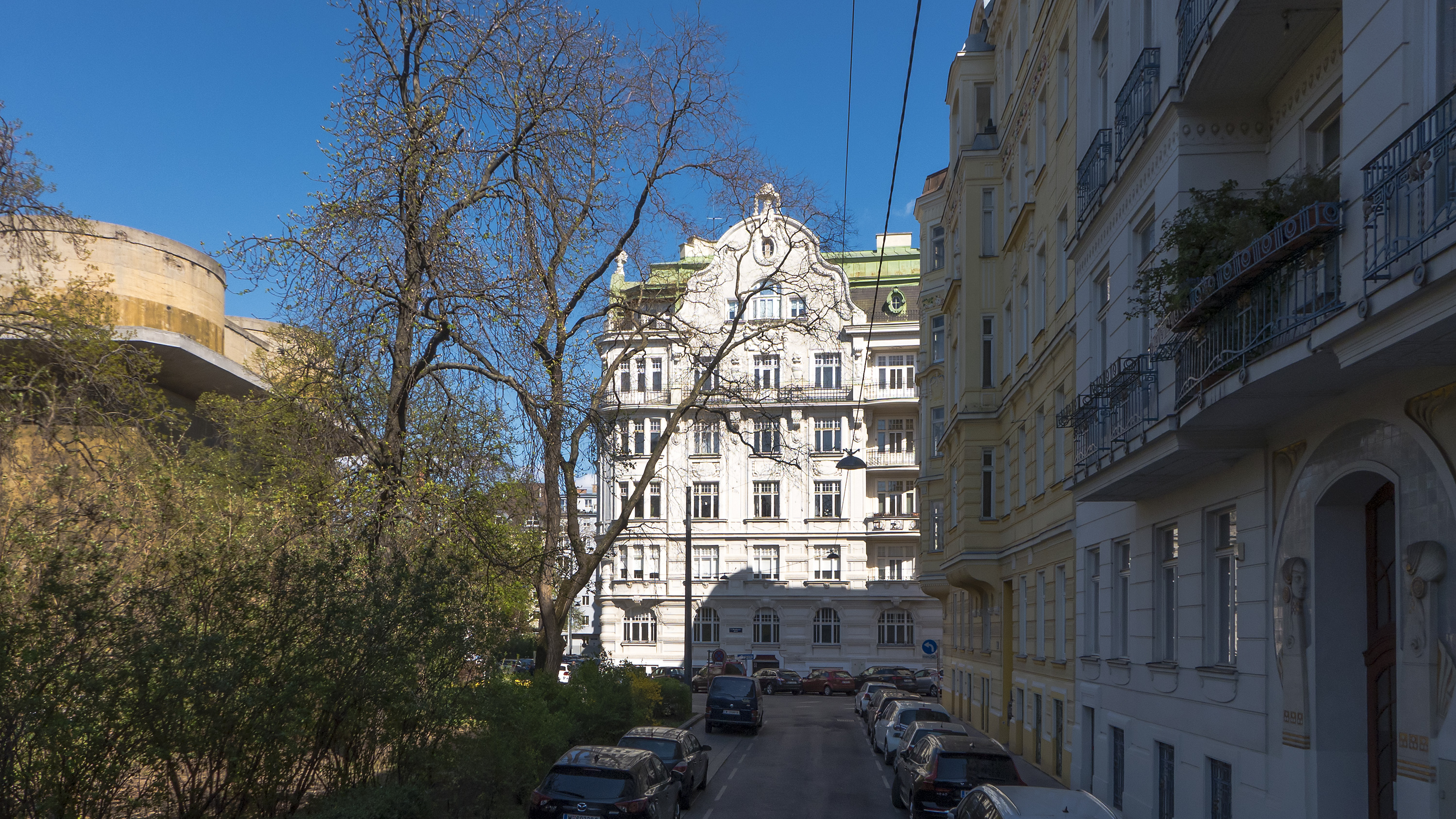 Dannebergplatz in Wien 3 bei Nr. 11